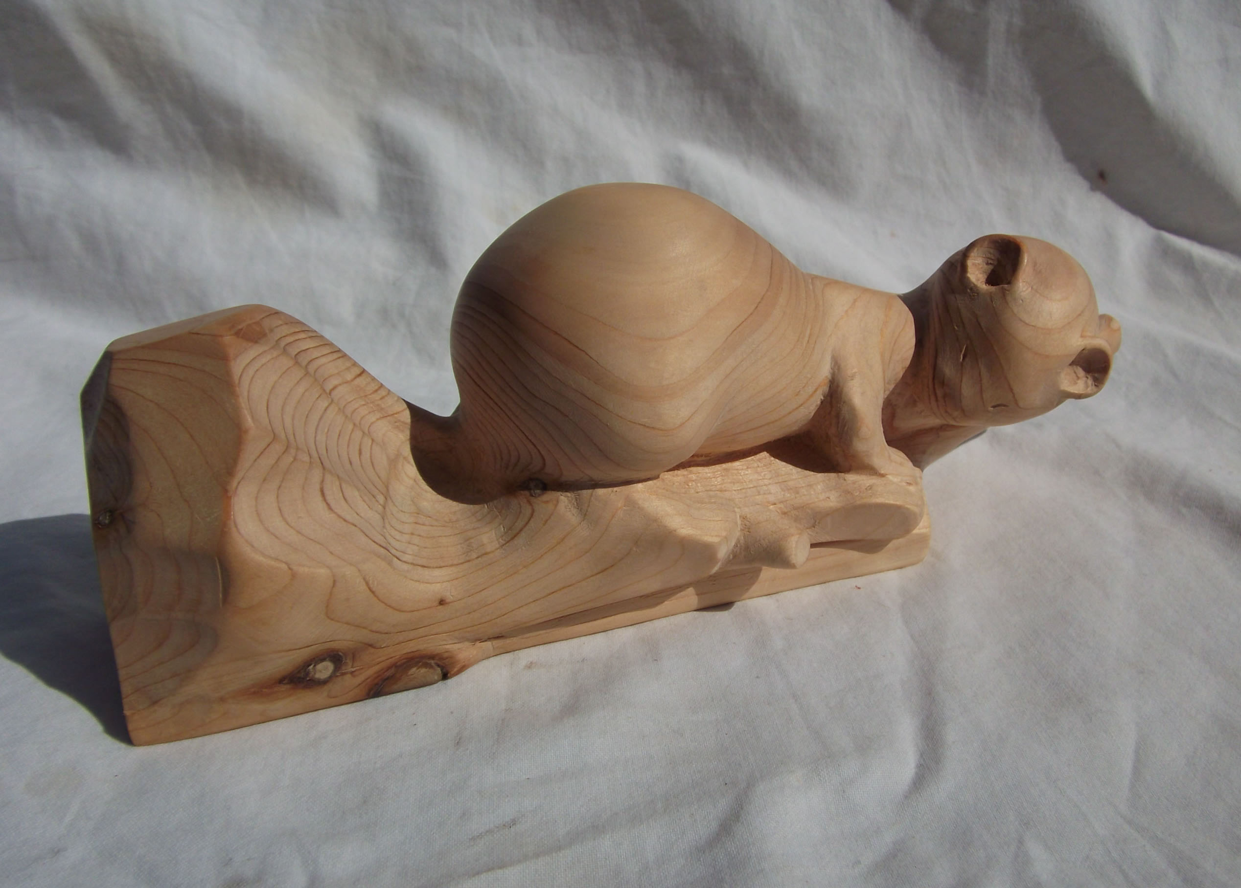 Sculpture de belette en genévrier 2011